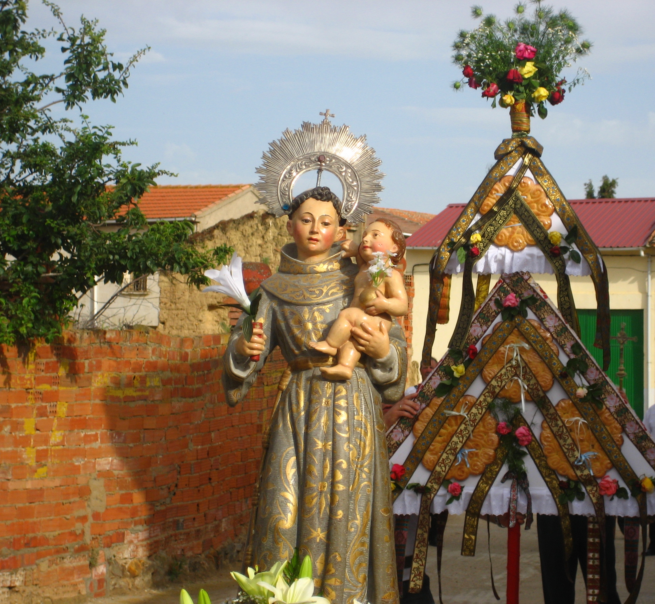 Procesión de las fiestas de San Antonio de Padua en Villanázar